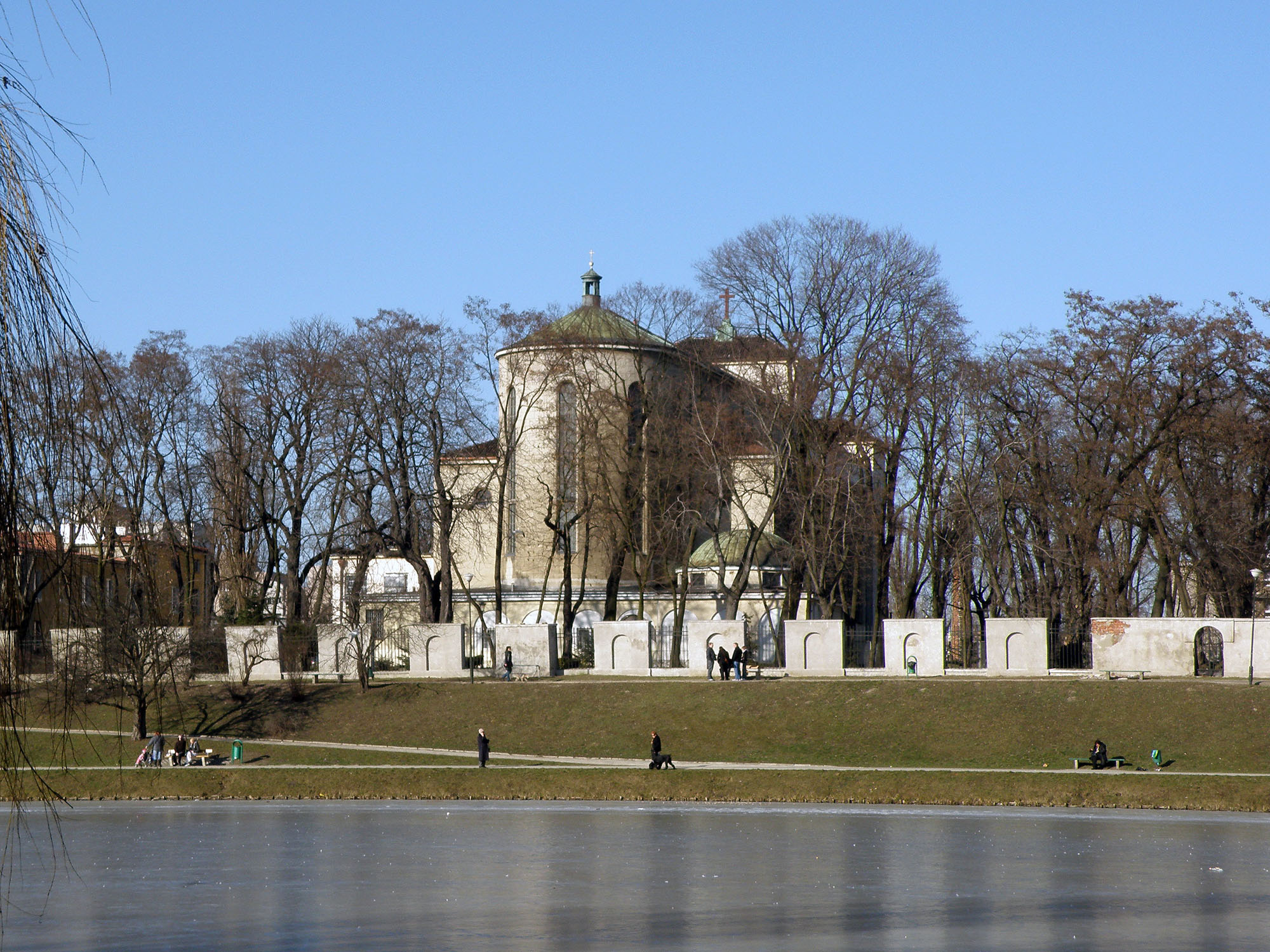 Warszawa, Kościół Matki Bożej Zwycięskiej na Kamionku